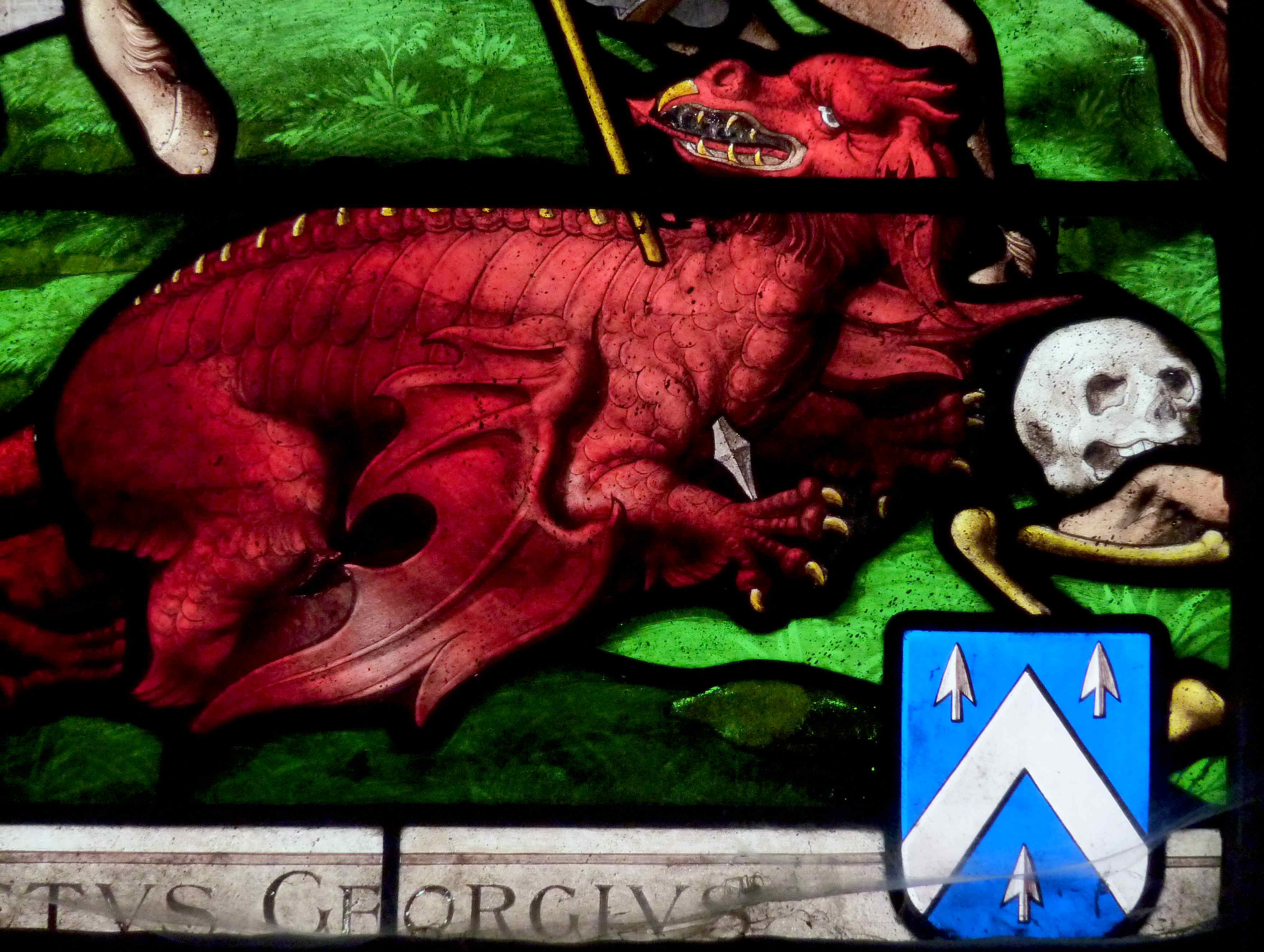 Katholische Kirche Saint-Pierre in Dreux im Département Eure-et-Loir (Centre-Val de Loire/Frankreich), Bleiglasfenster in der Clothildenkapelle mit den Wappen der Stifter; Darstellung: Hl. Georg (unten links), hl. Valentina (unten rechts), Antonius von Padua (oben links), hl. Christophorus (oben rechts), im Maßwerk: Hl. Clothilde; Ausschnitt: Drachen des hl. Georg